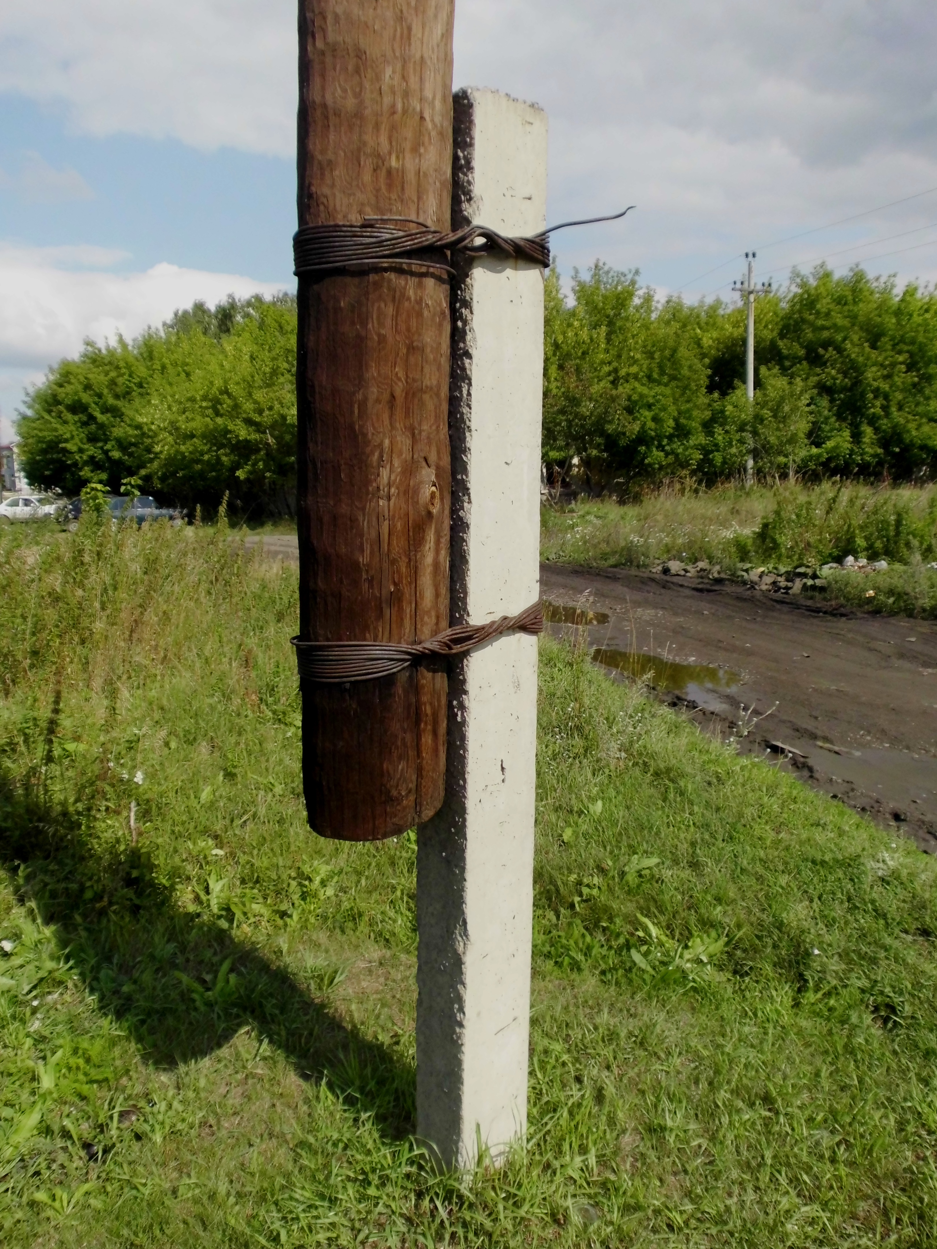 Деревянная опора воздушной линии электропередачи 220/380 В в сельской местности с железобетонным низом, крепление их между собой проволочной обтяжкой. Челябинская область.